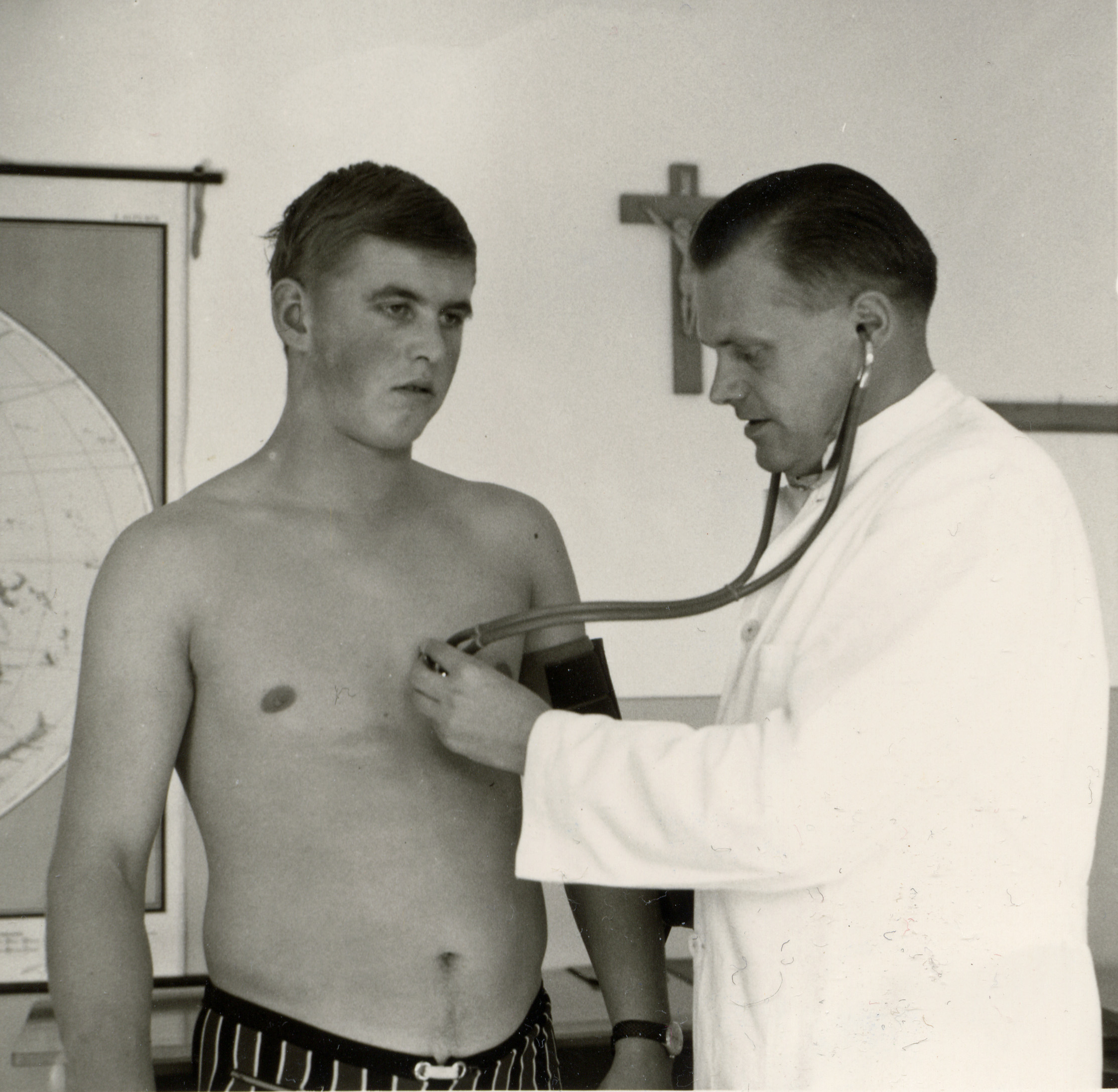 Musterung bei der Bundeswehr im bayerischen Kempten (1968).